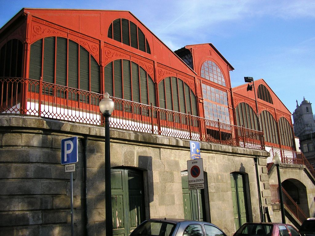 Old "Ferreira Borges" market in Porto, Portugal. Author: Manuel de Sousa.